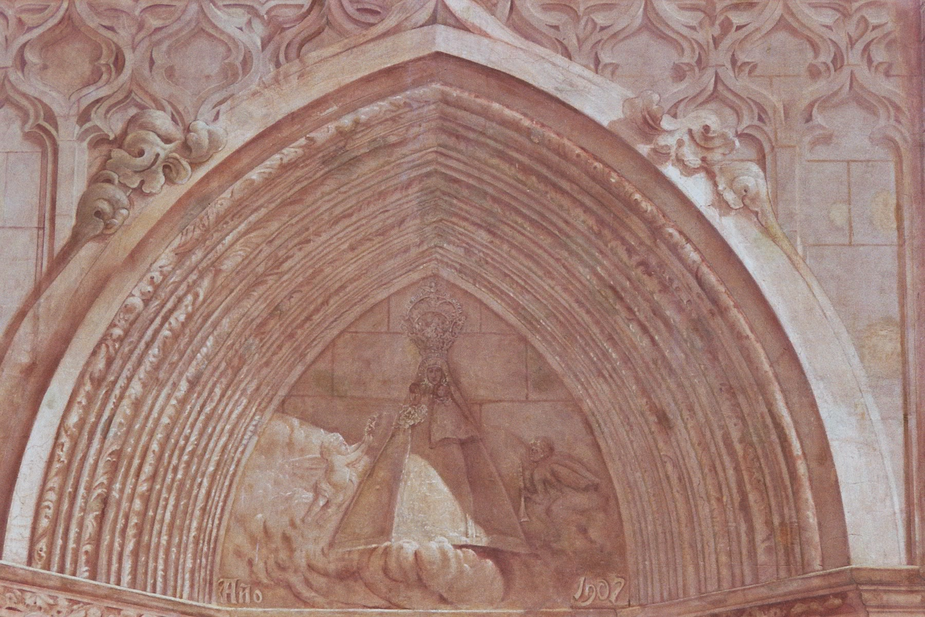 Detalle de la fachada con la imagen de Nuestra Señora de Gracia.